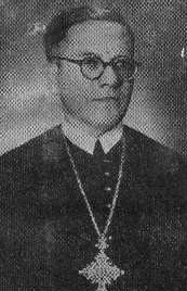 Václav Jan Pokorný, moravský římskokatolický duchovní